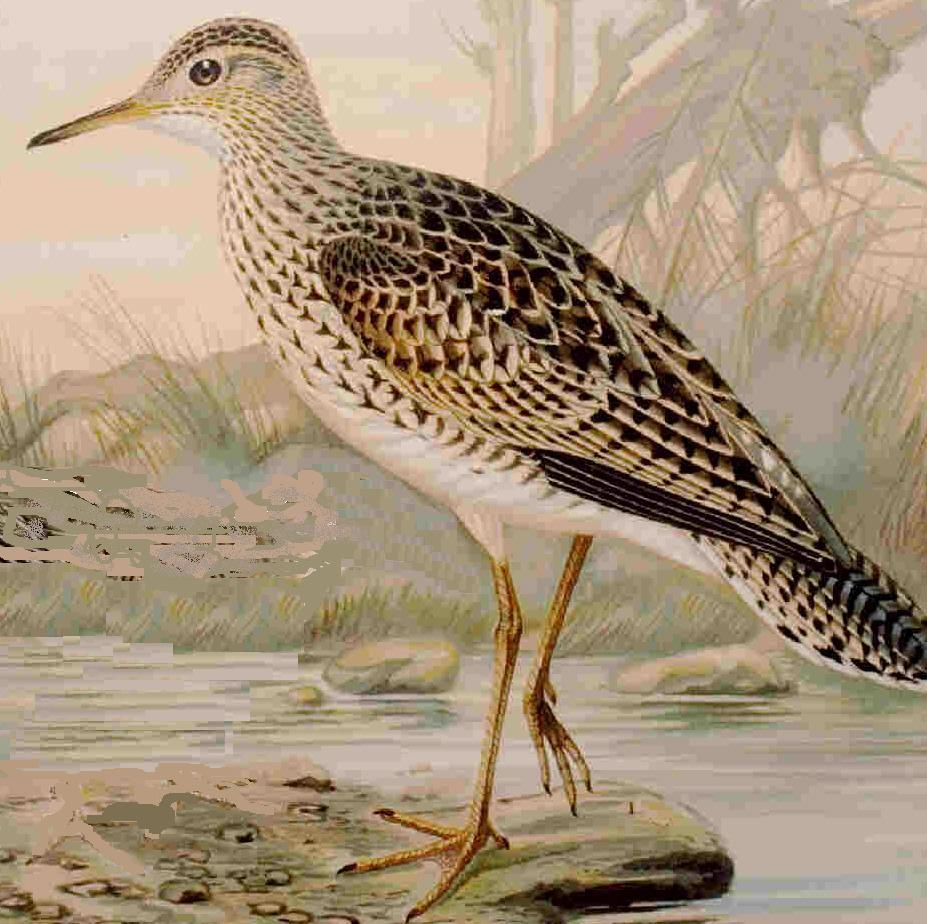 Upland sandpiper Bartramie ou maubèche des champs